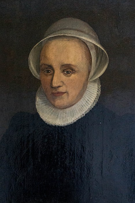 Portret van de vrouw van dominee Johannes Switterius, gereformeerd predikant van 1594-1633 te Nijkerk